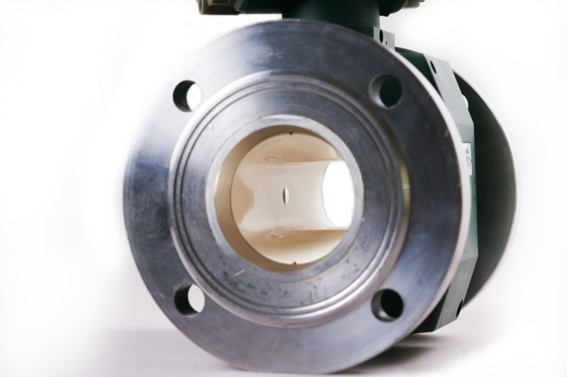 Вид внутри канала расходомера электромагнитного. Видна изолирующая футеровка канала и электроды.